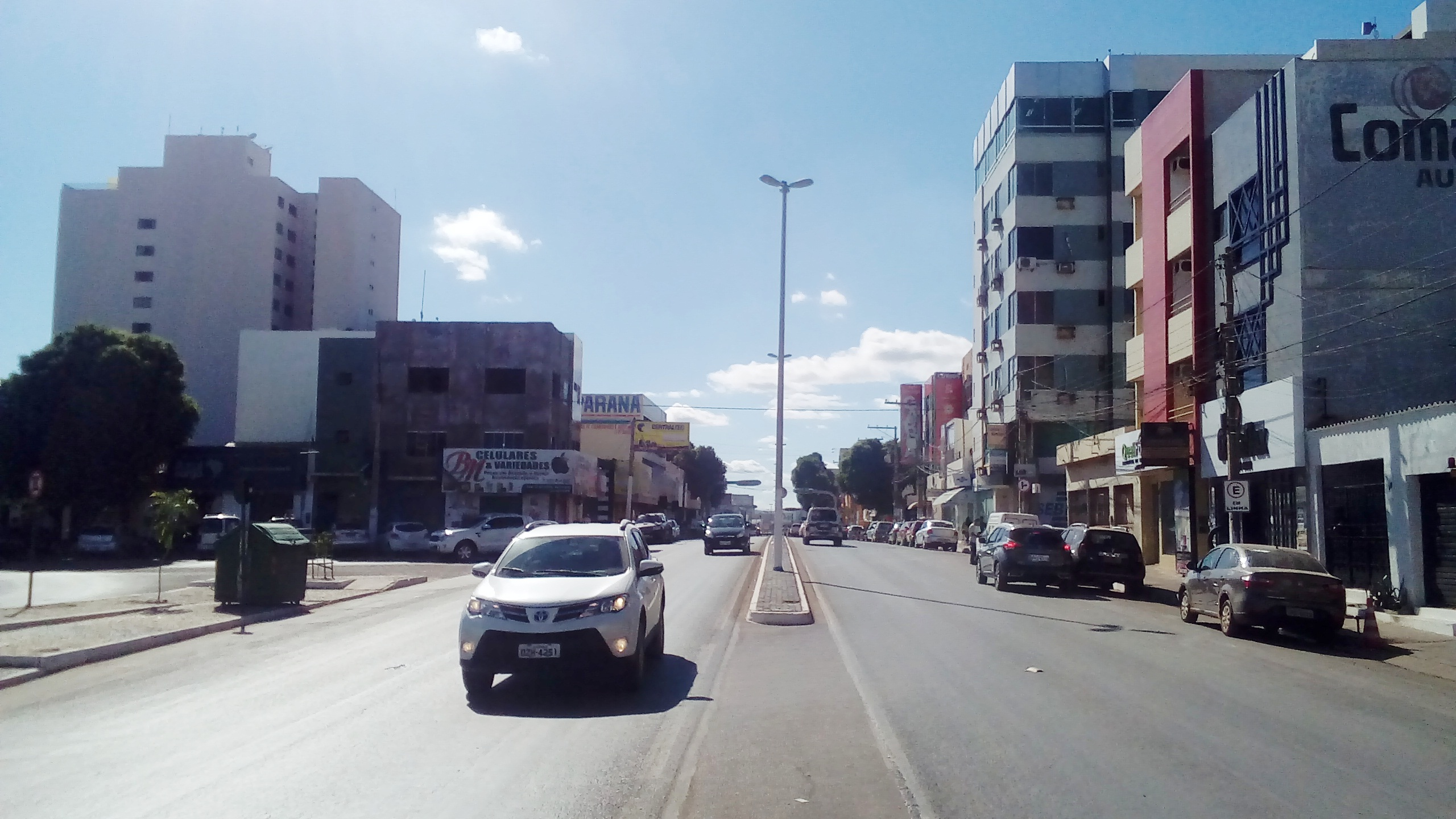 Avenida Benedita Silveira, uma das principais e mais movimentadas avenidas de Barreiras, Bahia (Brasil)